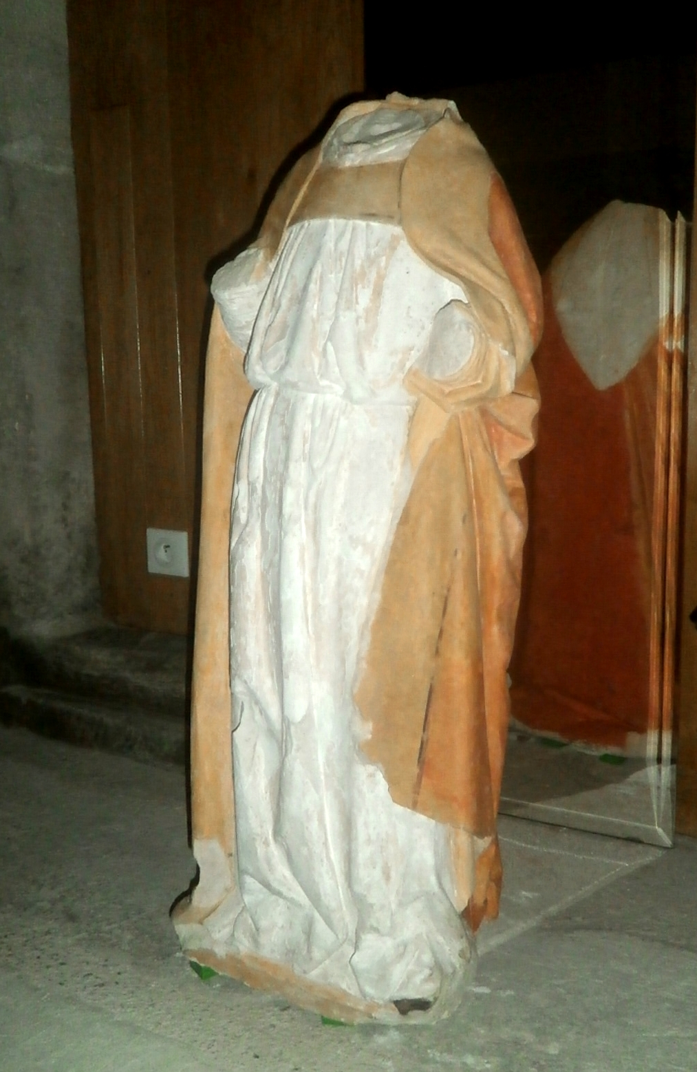 Statue (d'évêque ?) retrouvée dans les fouilles de la chapelle.